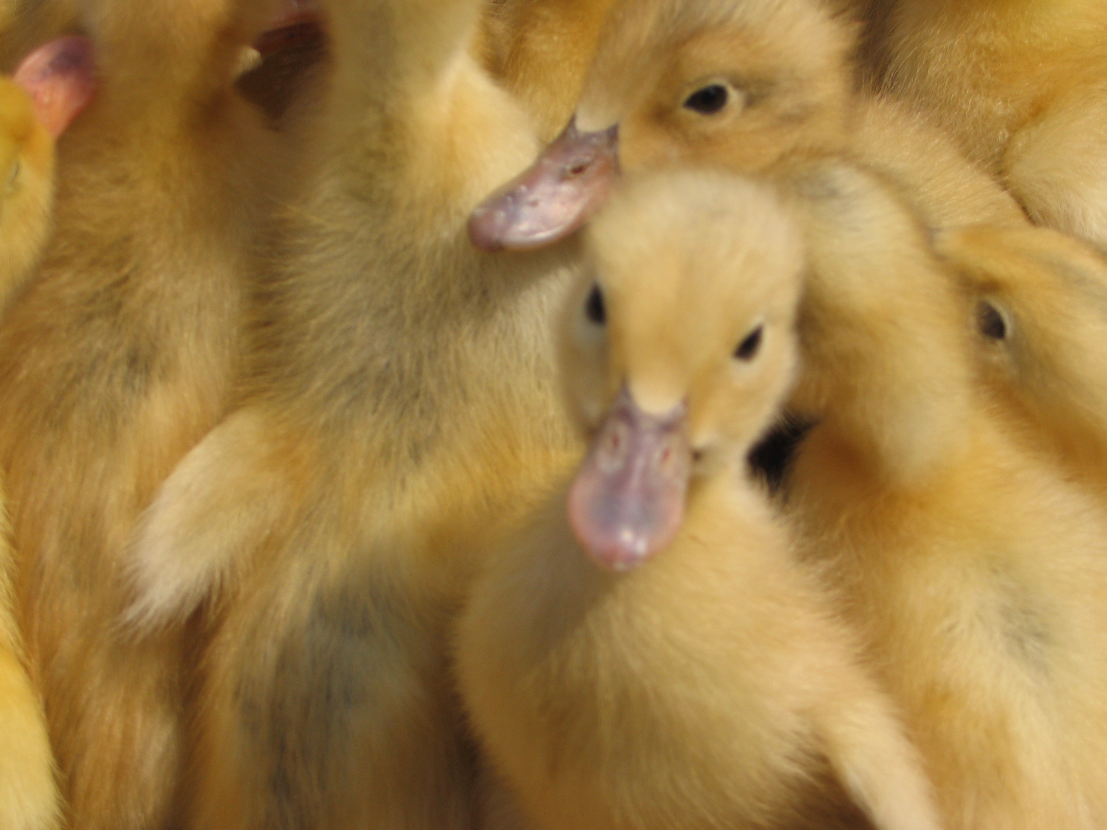 中文（香港）: 幼小的鴨仔